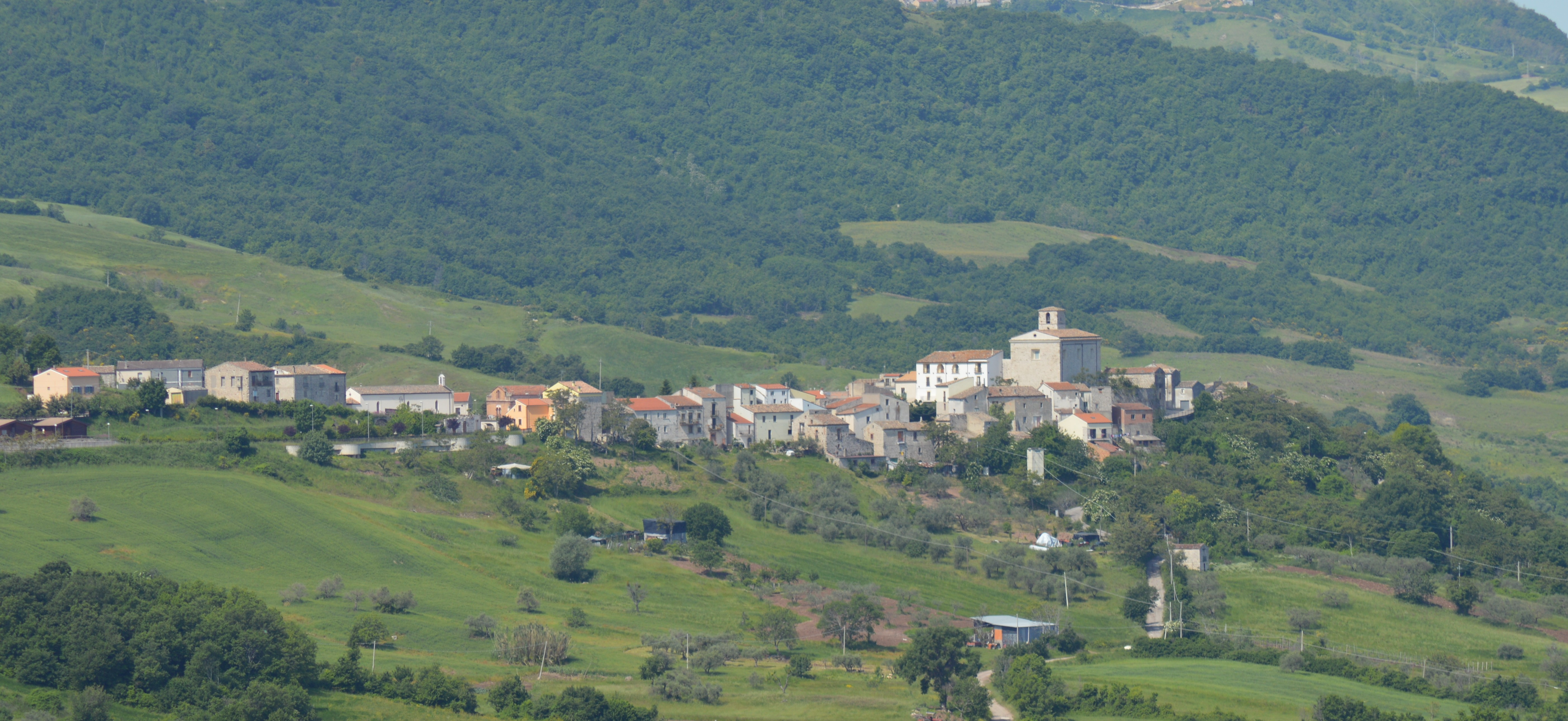 Provvidenti-CB